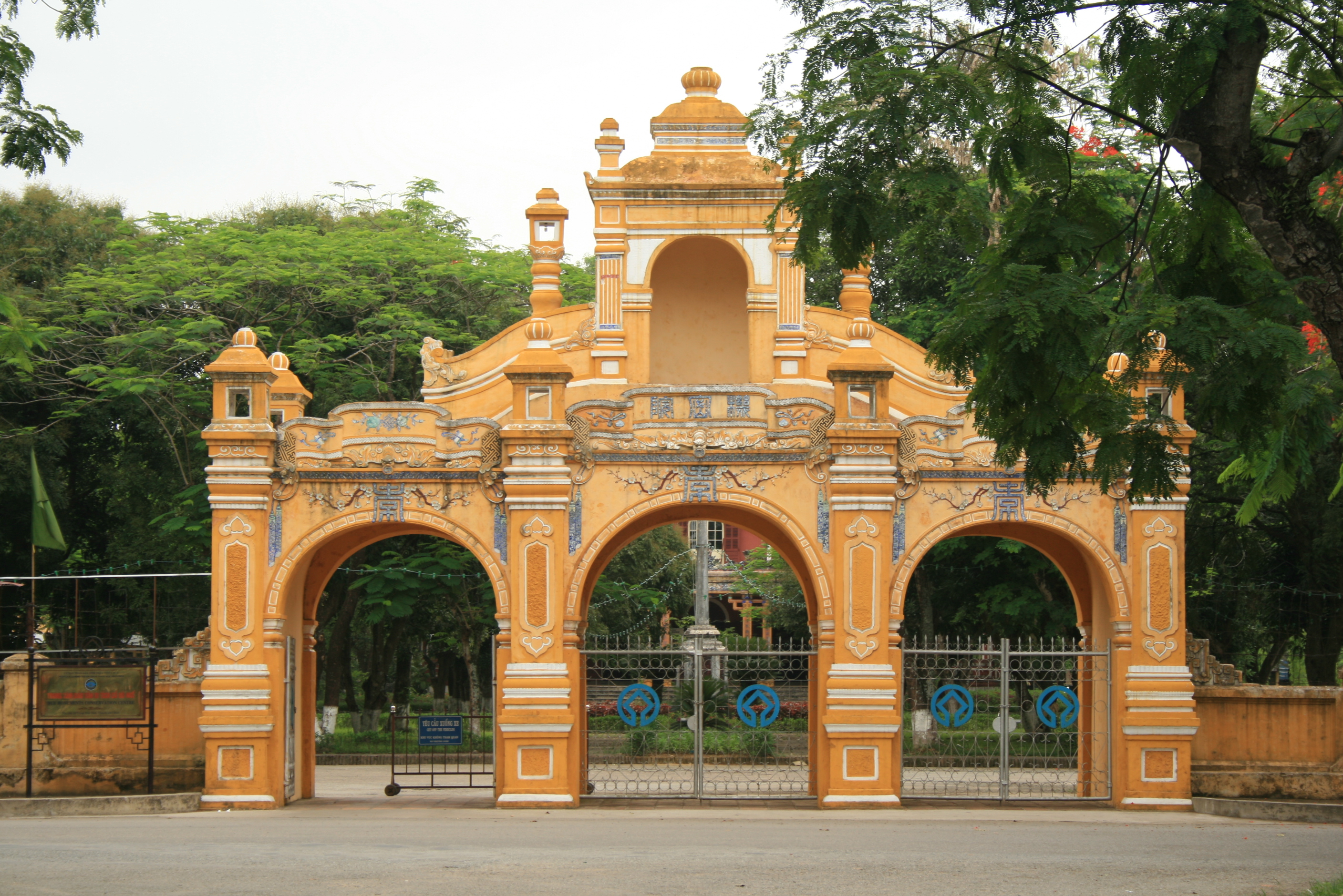 Cổng Viện cơ mật- Tam Toà Huế